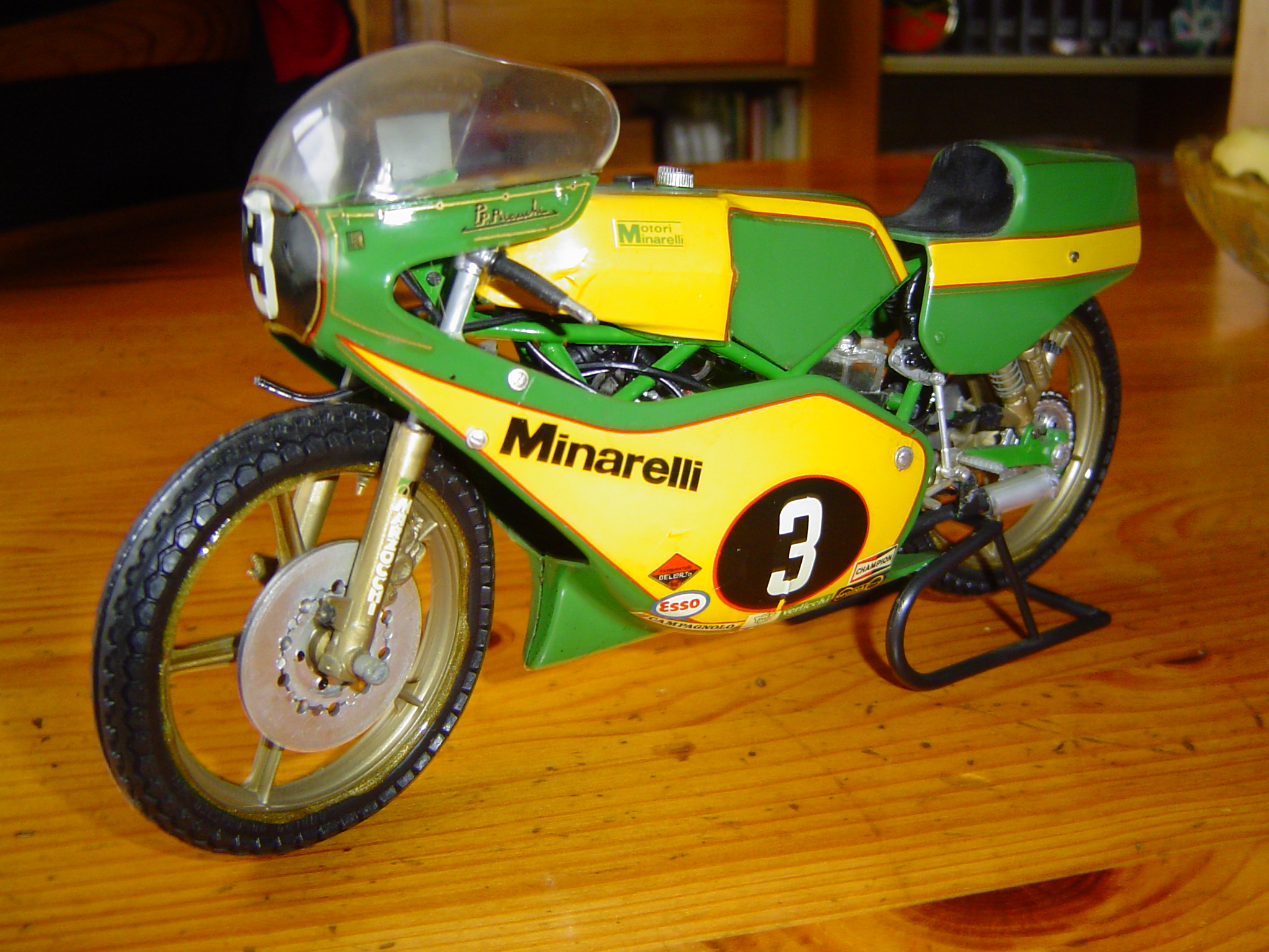 Riproduzione in scala della Minarelli 125 GP di Pierpaolo Bianchi del 1979.